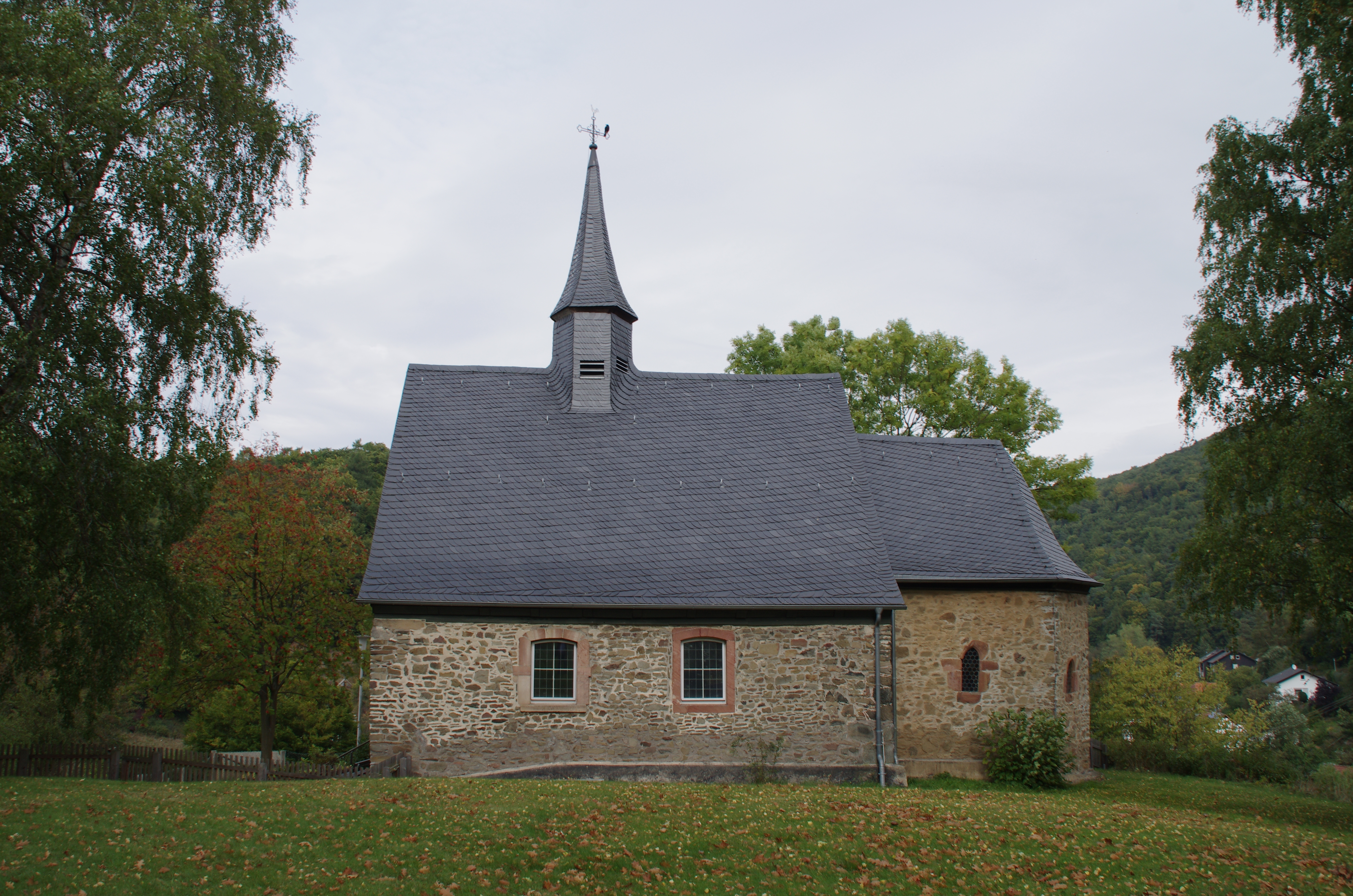 Bad Wildungen, Ortsteil Frebershausen in Hessen. Die Kirche befindet sich oberhalb des Ortes.